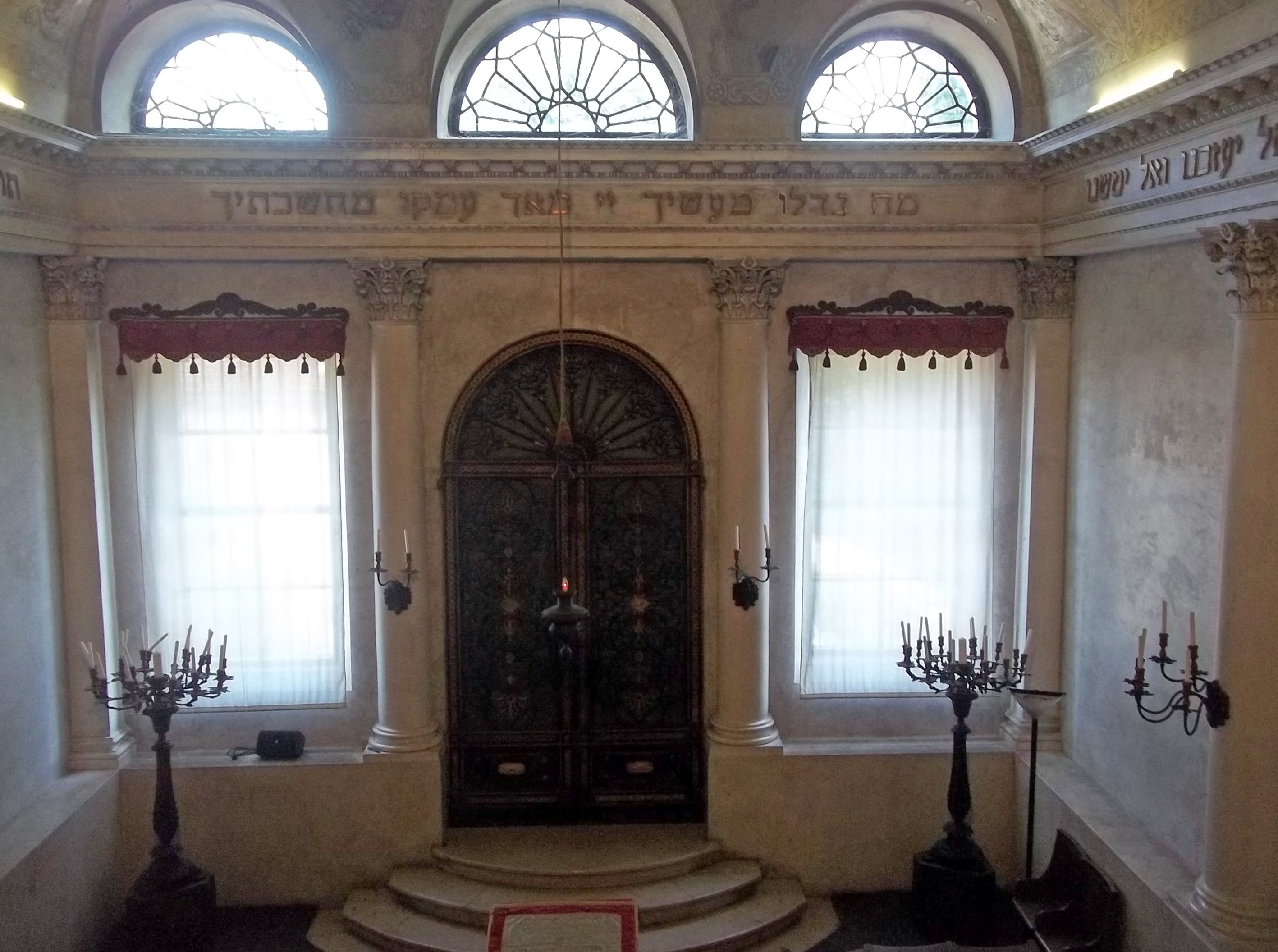 המוזיאון העברי על-שם פאוסו לוי ובית הכנסת בעיר סריאנה